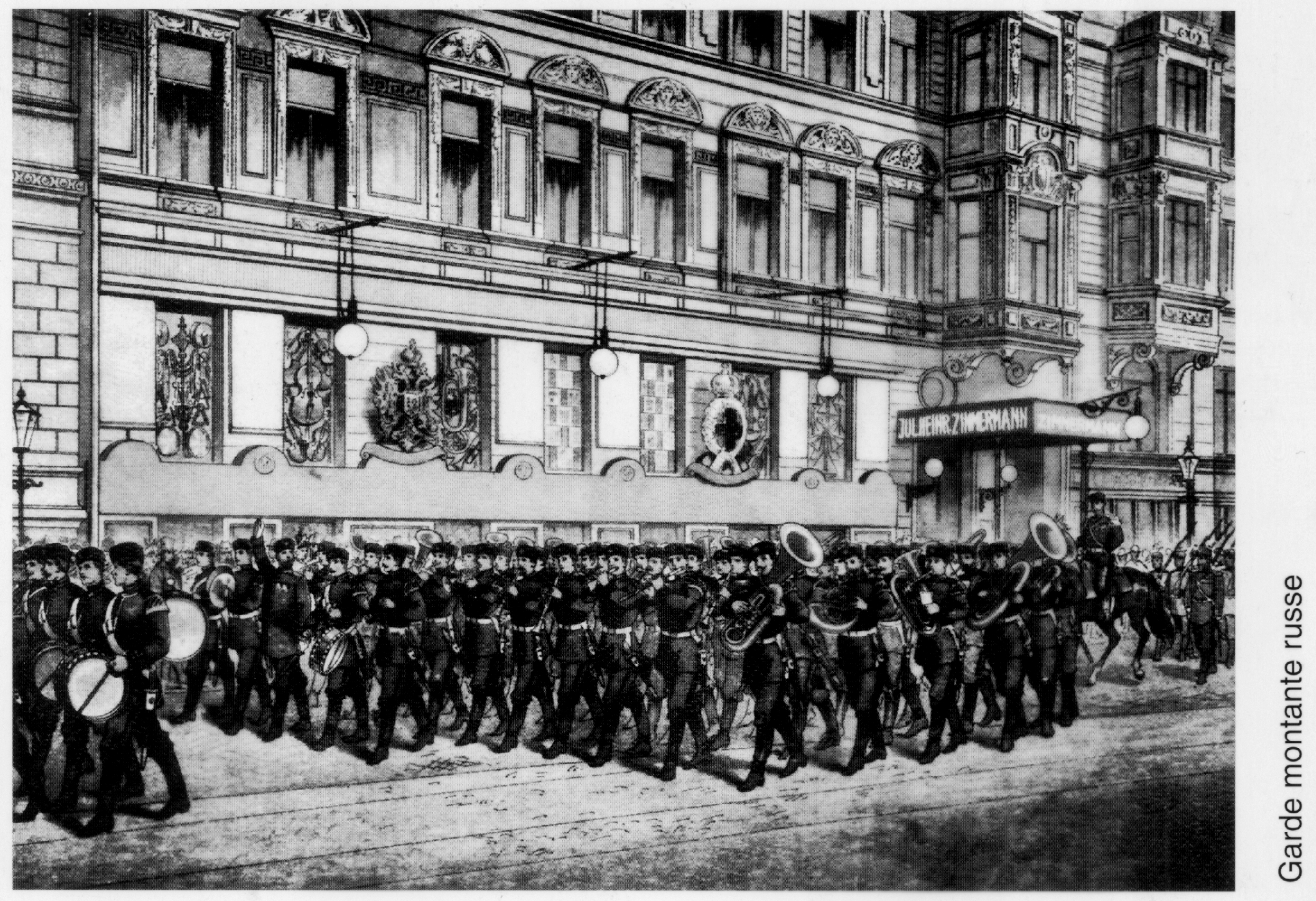 Wachtparade vor dem Zimmermann-Verlagsgebäude in St. Petersburg